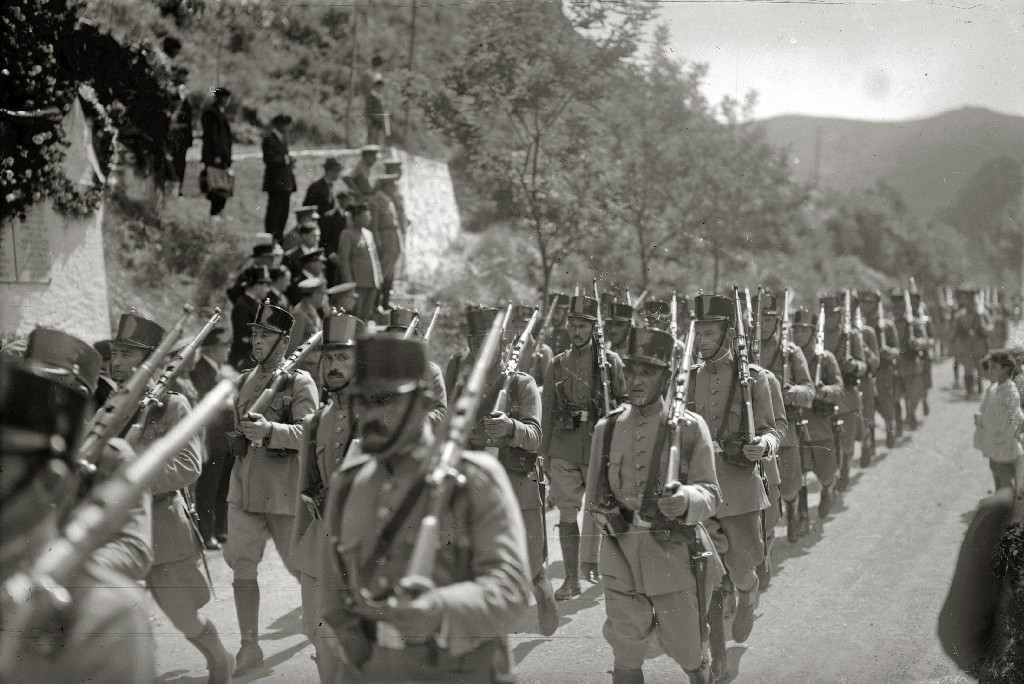 Título original: Celebración de un acto castrense en honor a las víctimas del fusilamiento de Endarlaza en la localidad de Irun (4/6) Localización: Irún (Guipúzcoa)